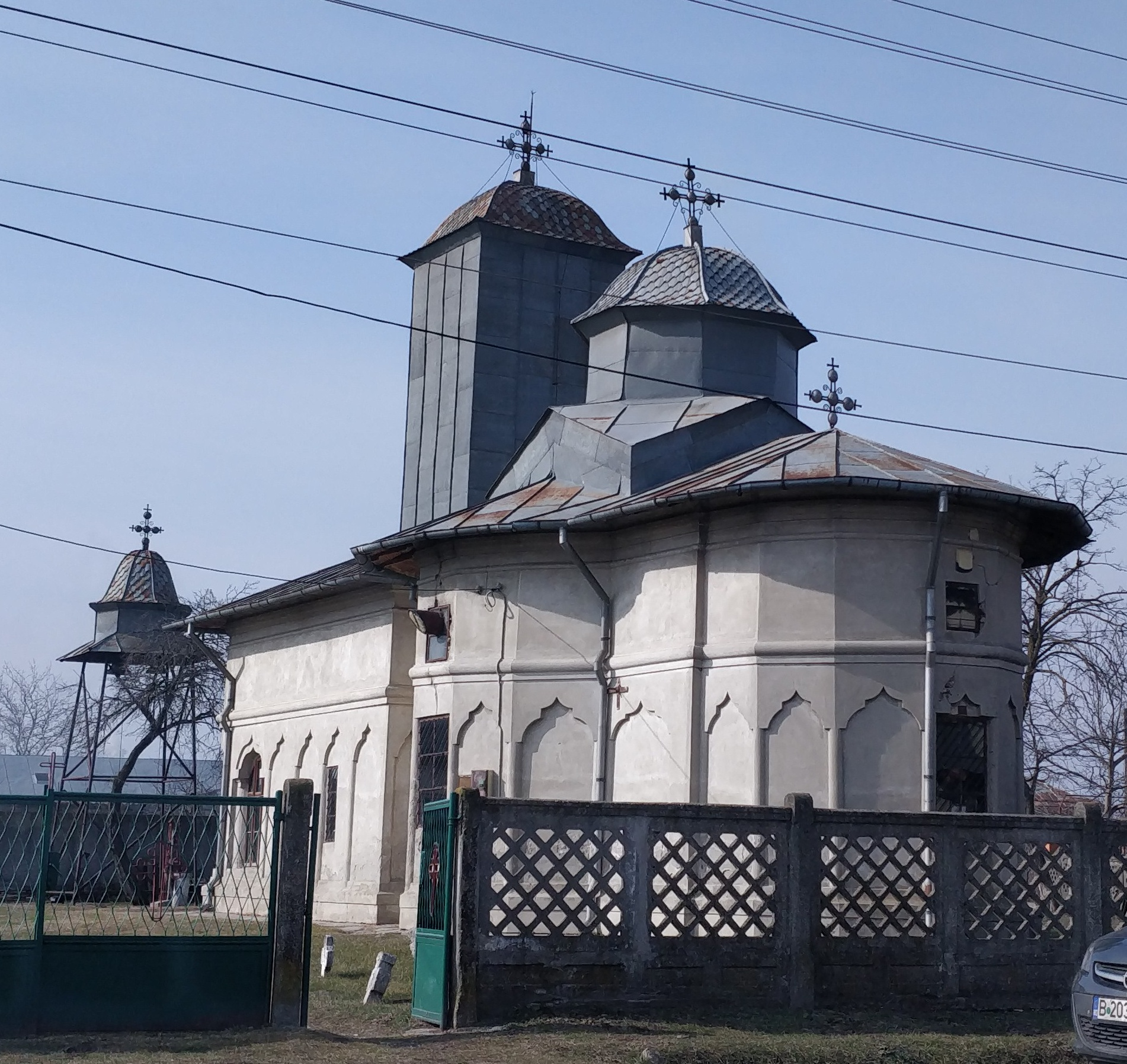 Biserica din Poenari, monument istoric